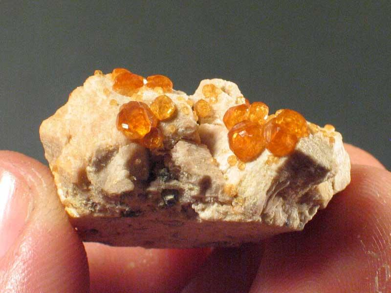 granat, pochodzenie Chiny, Tong Bei; autor zdjęcia Stowarzyszenie Spirifer